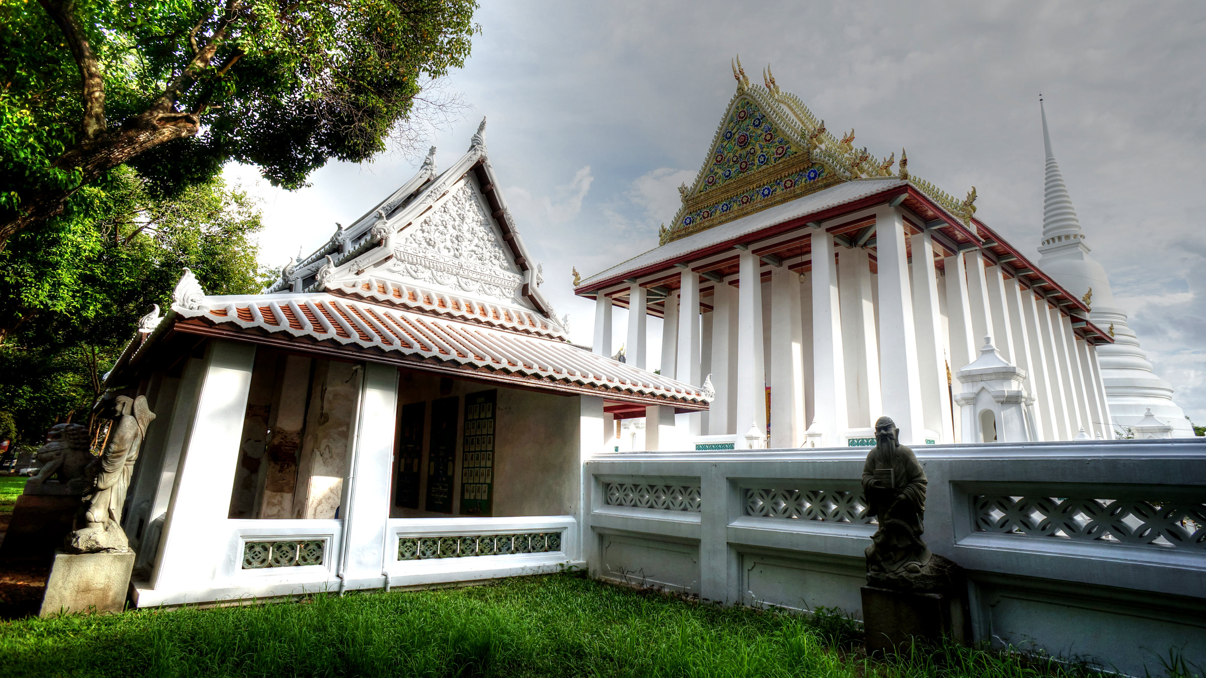 วัดเฉลิมพระเกียรติวรวิหาร / Wat Chaloem Phra Kiat Worawihan